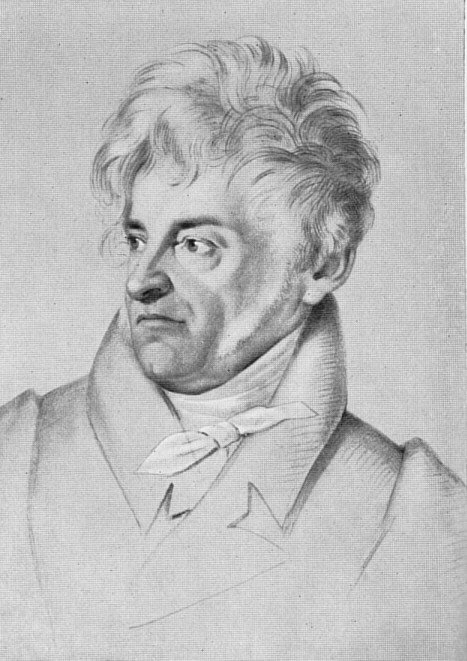 Josef Wilhelm Eduard d'Alton